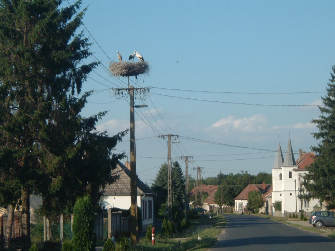 Tompaládony, Hungary